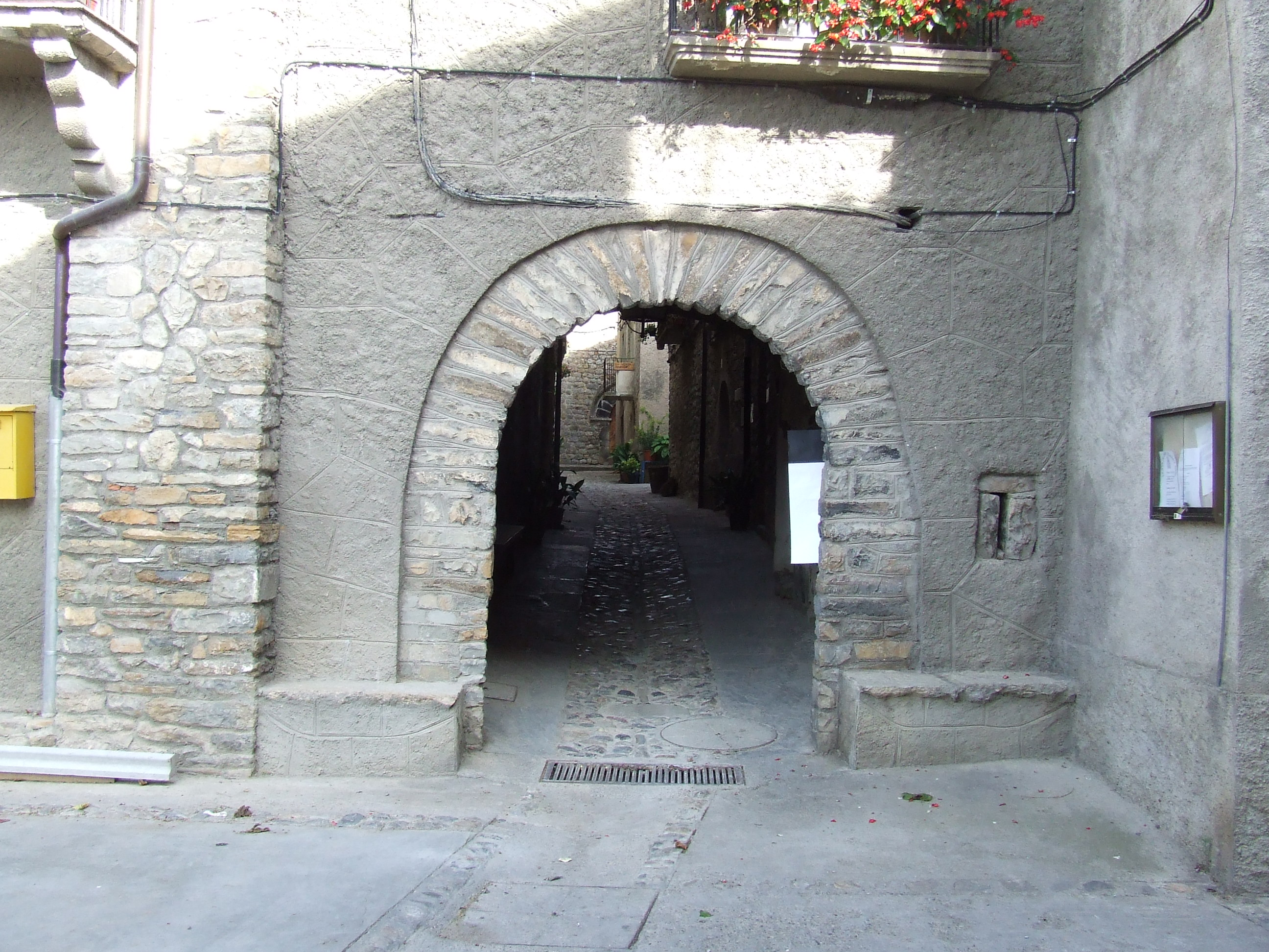 Sant Martí de Canals: portal i carrer únic (Claverol, Pallars Jussà)